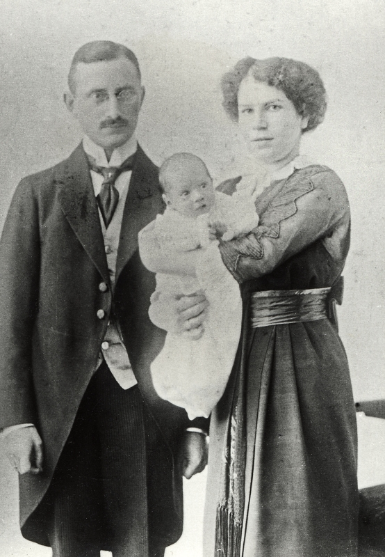 Fritz Hirsch und Ehefrau Anna mit Peter